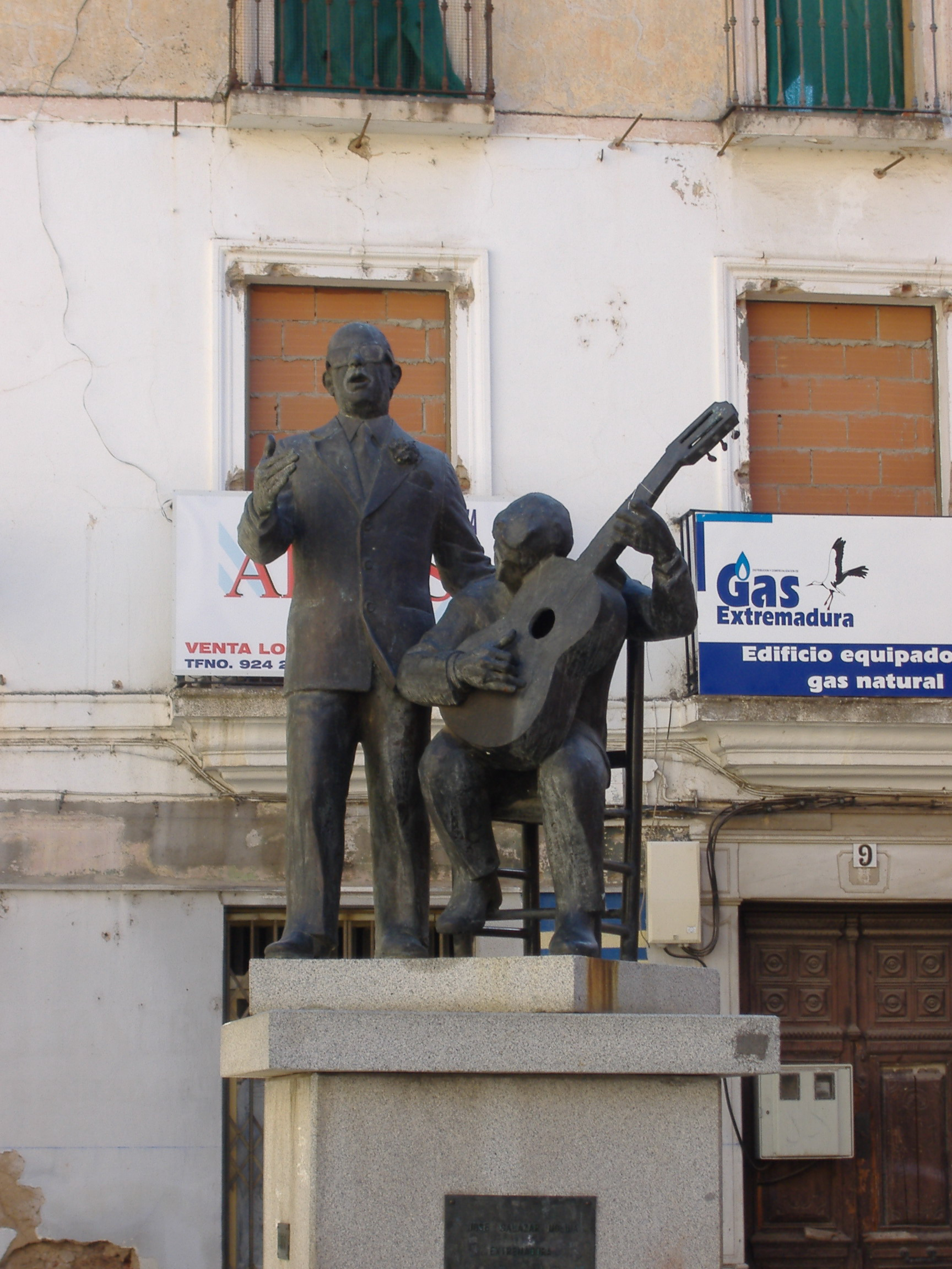 Porrina de Badajoz. Cantaor flamenco del siglo XX.